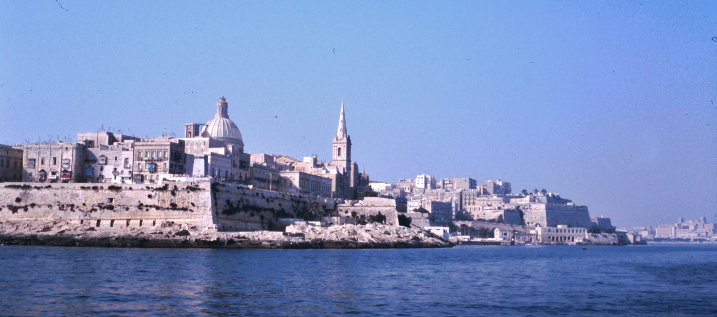 Valletta